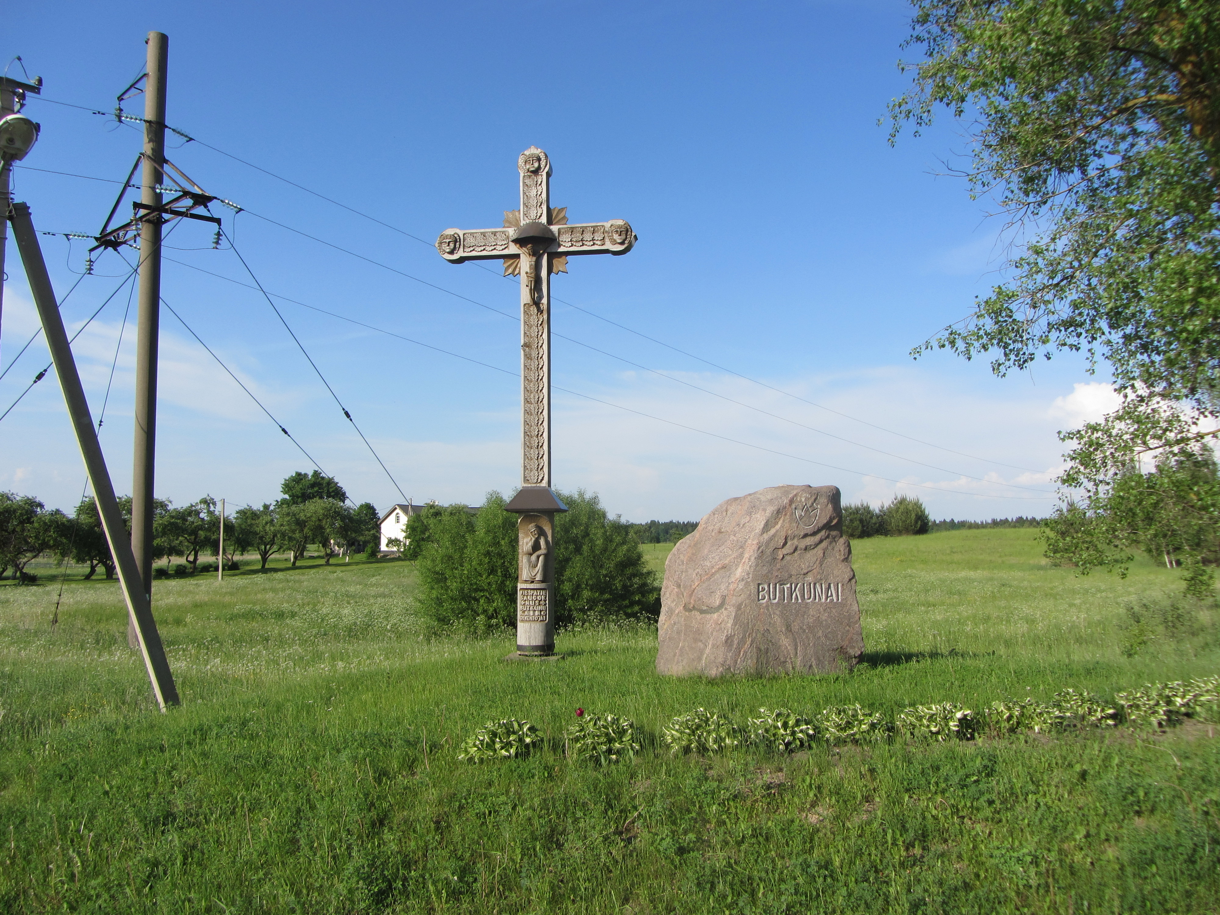 Butkūnai, Lithuania